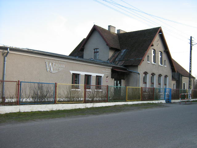 Szkoła podstawowa w Ładzinie